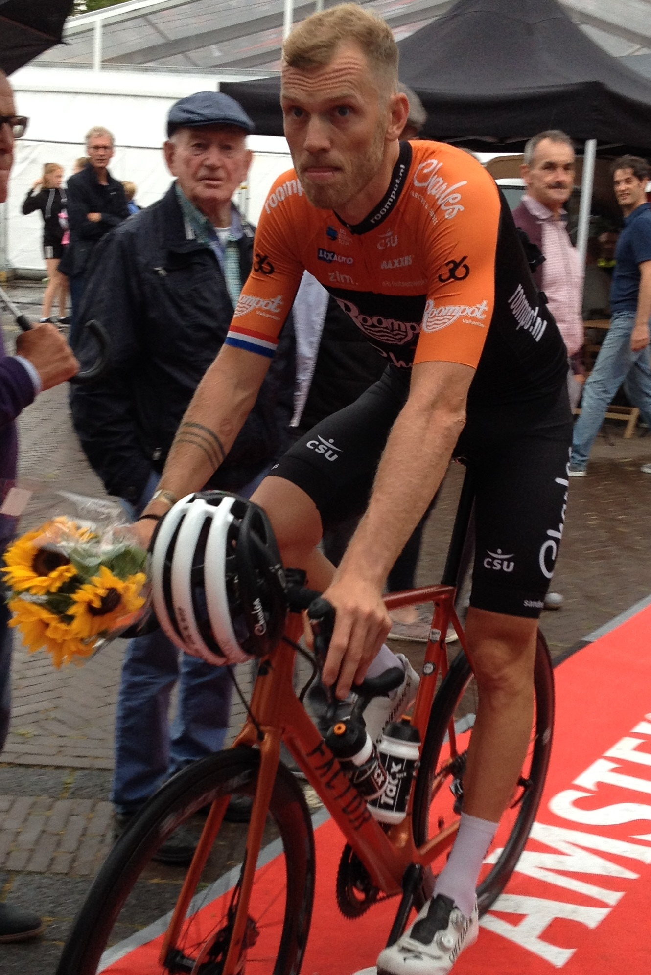 Criterium RaboRonde in Heerlen op vrijdag 2 augustus 2019